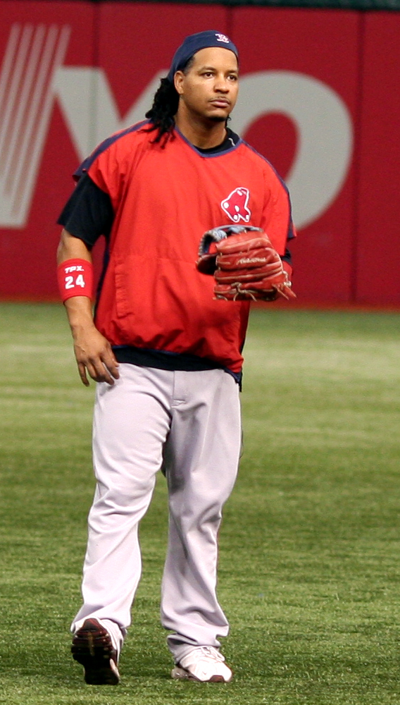 Photograph taken by Googie Man 04:57, 22 September 2007 . . Googie man . . 568×1000 (481 KB)